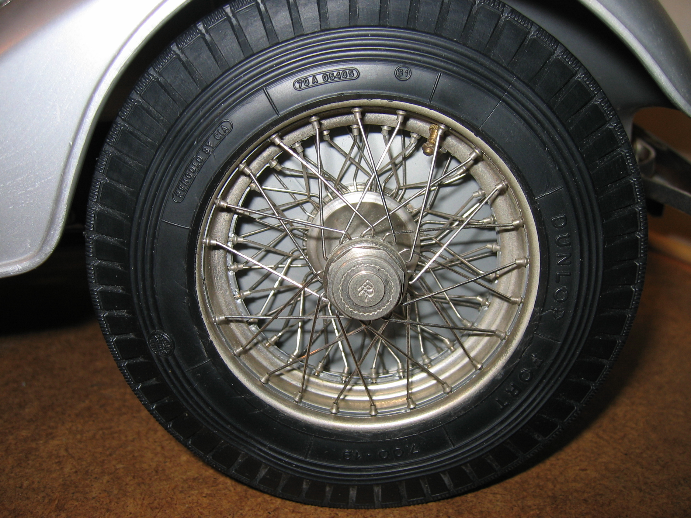 Eigen foto Gebruiker:Mhwater